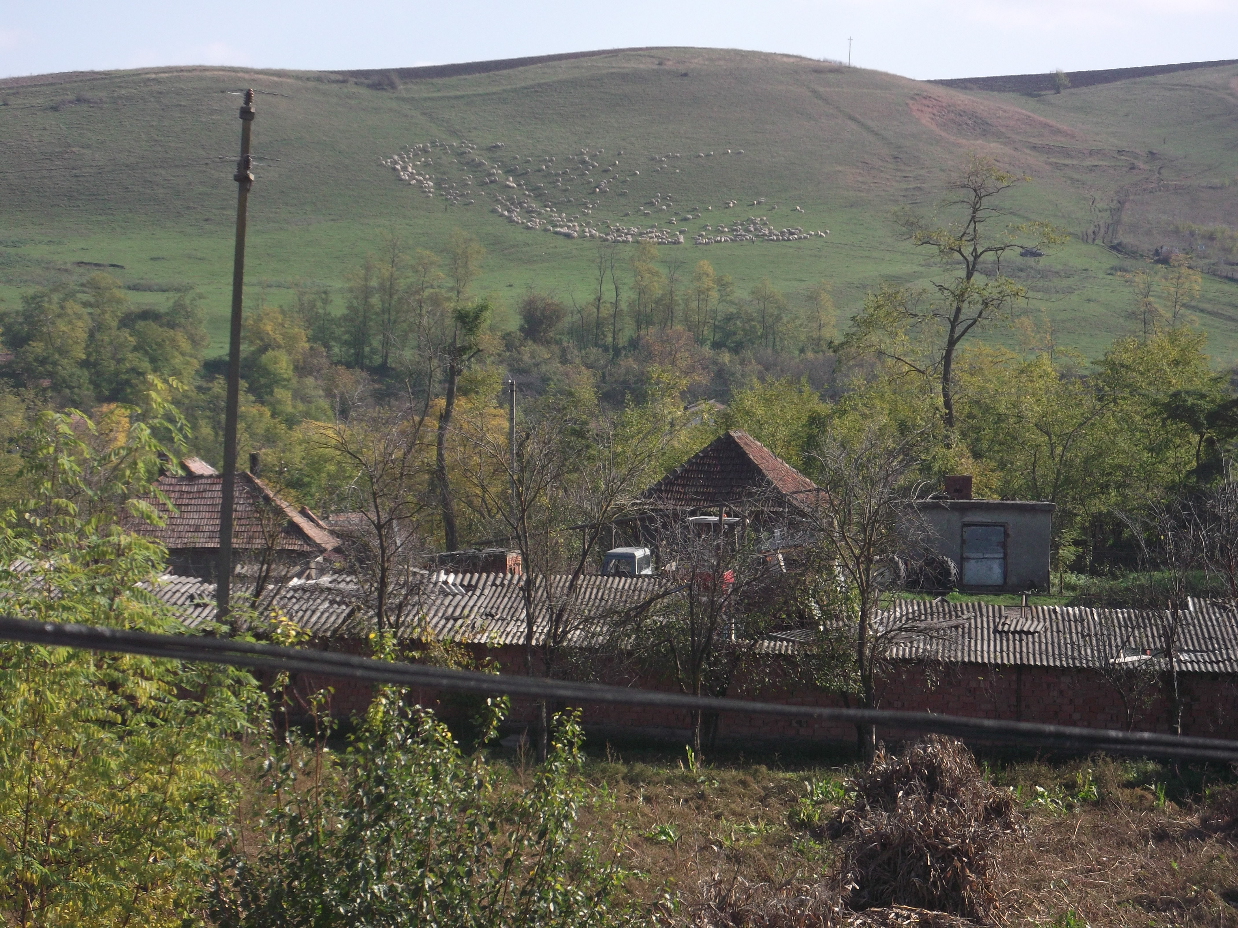 Aruncuta - pasunatul ovinelor